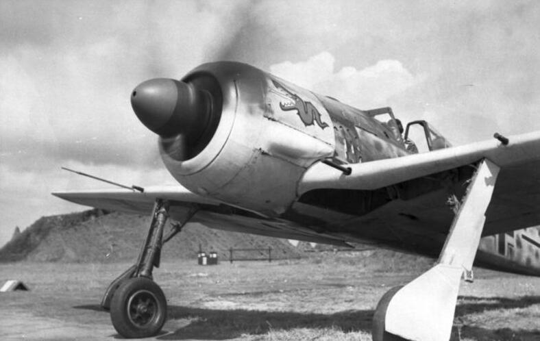 Information added by Wikimedia users.Eine Focke-Wulf Fw 190. Möglicherweise ist dies eine Fw 190A-3 der 5./JG 1 in Katwijk (Niederlande) im Sommer 1942. (Siehe: Ketley/Rolfe: Luftwaffen-Embleme 1939-1945. Bonn 2001 ISBN 3763759867, Fotos S. 8)